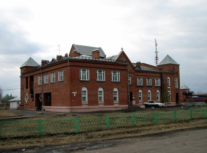 Азово, Омская область